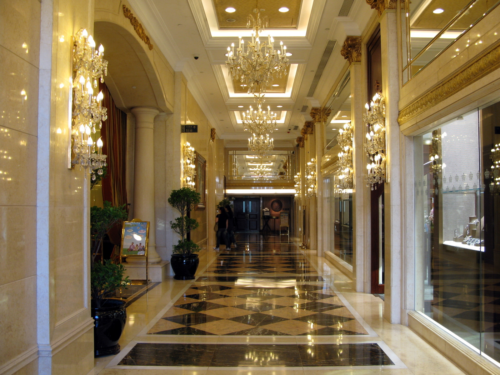 Macao Grand Emperor Hotel 英皇娛樂酒店 (澳門)